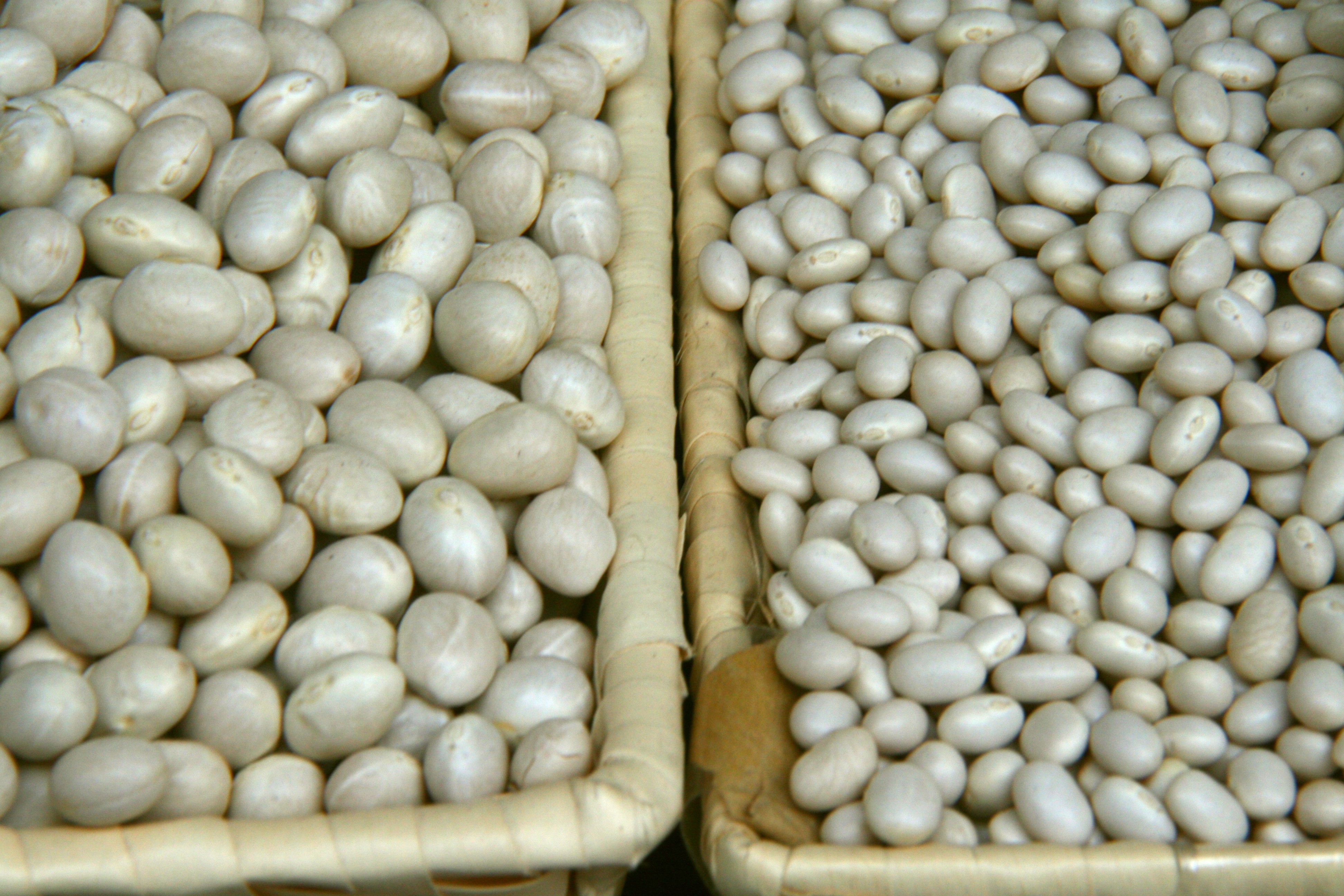 comparación de dos alubias Pochas - ('a la izquierda') Arrocinas - ('a la derecha')